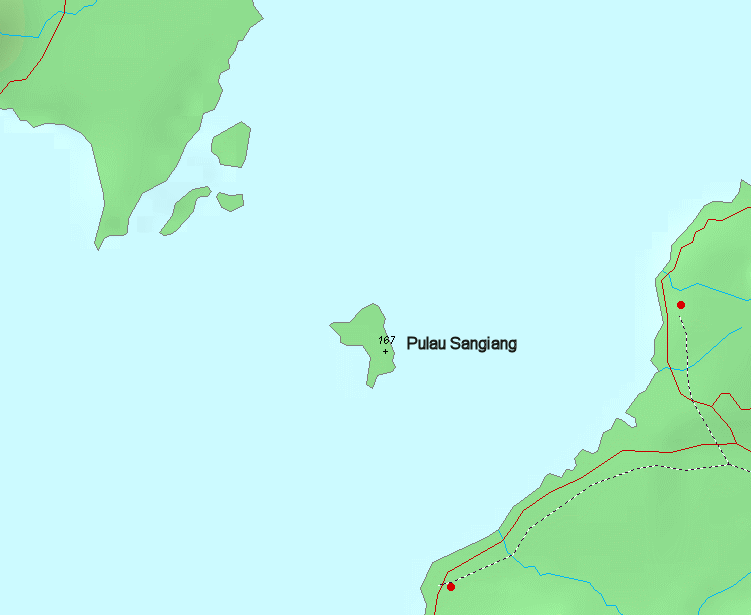 Kaart Pulau sangiang.